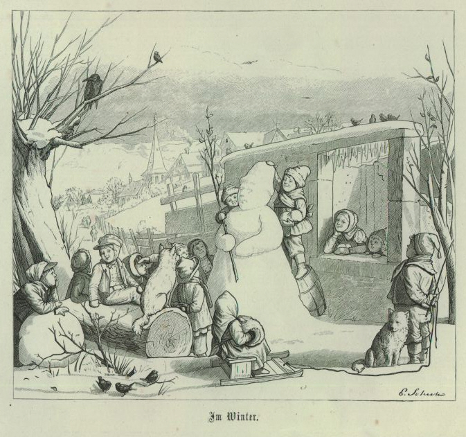 Aus: Die Welt im Kleinen : zwölf Bilder aus dem Kinderleben. Ein Familienbuch von Eduard Schulz mit Text von Emil Rittershaus., Flemming, Glogau 1867